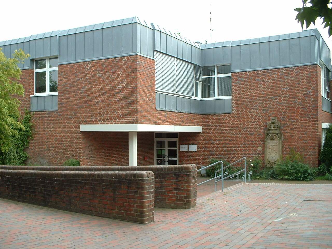 Hochschule Vechta, Niedersachsen Summary: Hochschule Vechta, Institutgebäude N Source: self-made photo Photograph: P_A Date: Summer 2007 Licence: GNU FDL